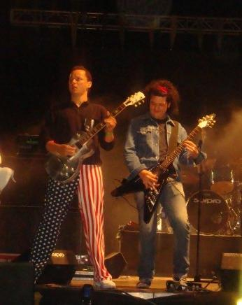 Rosso y Jonas de Plastilina Mosh